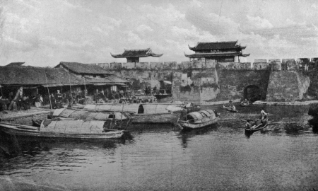 宁波城墙望京门